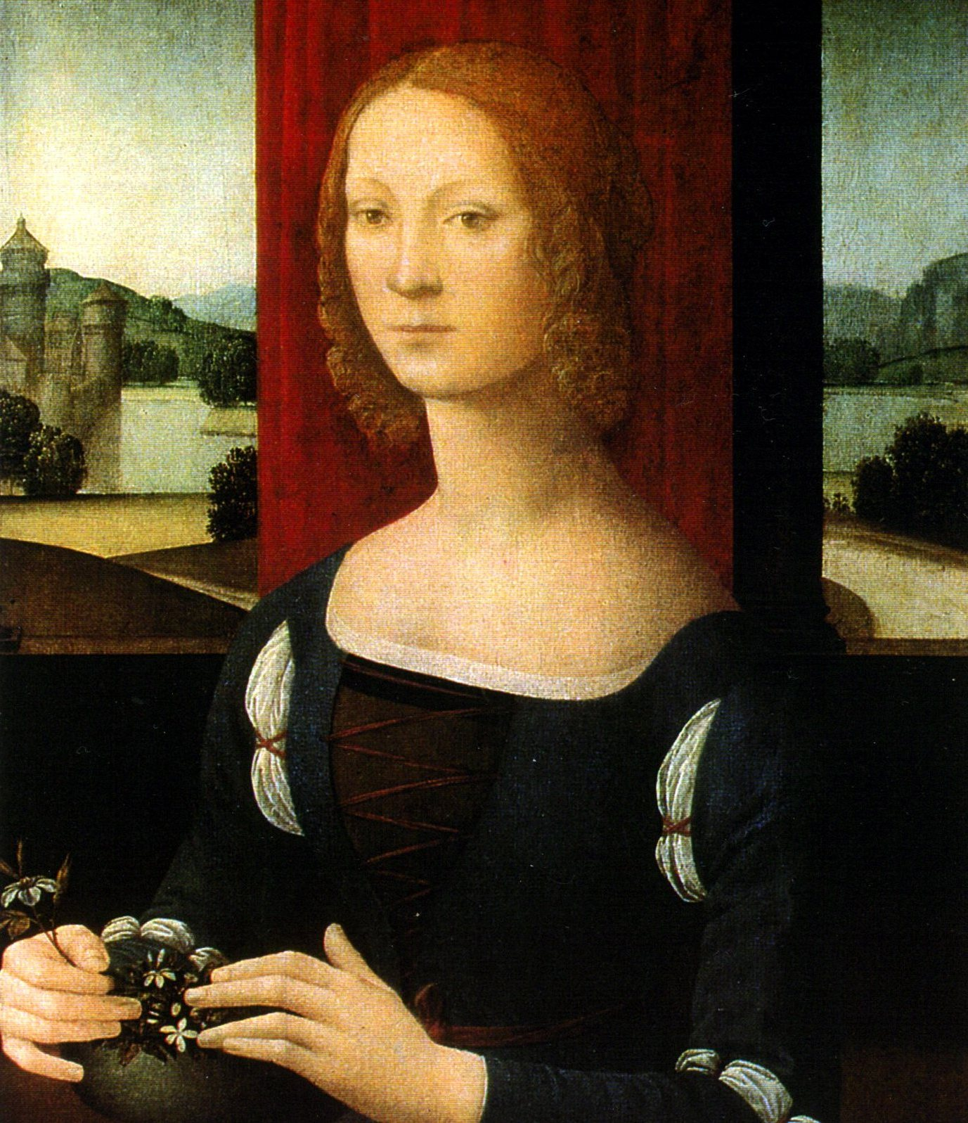 La dama dei gelsomini, conosciuto anche come Ritratto di Caterina Sforza